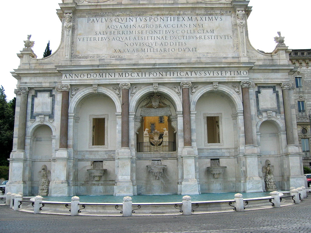 Fontana dell'Acqua Paola, Gianicolo, Roma. Picture by Torvindus.